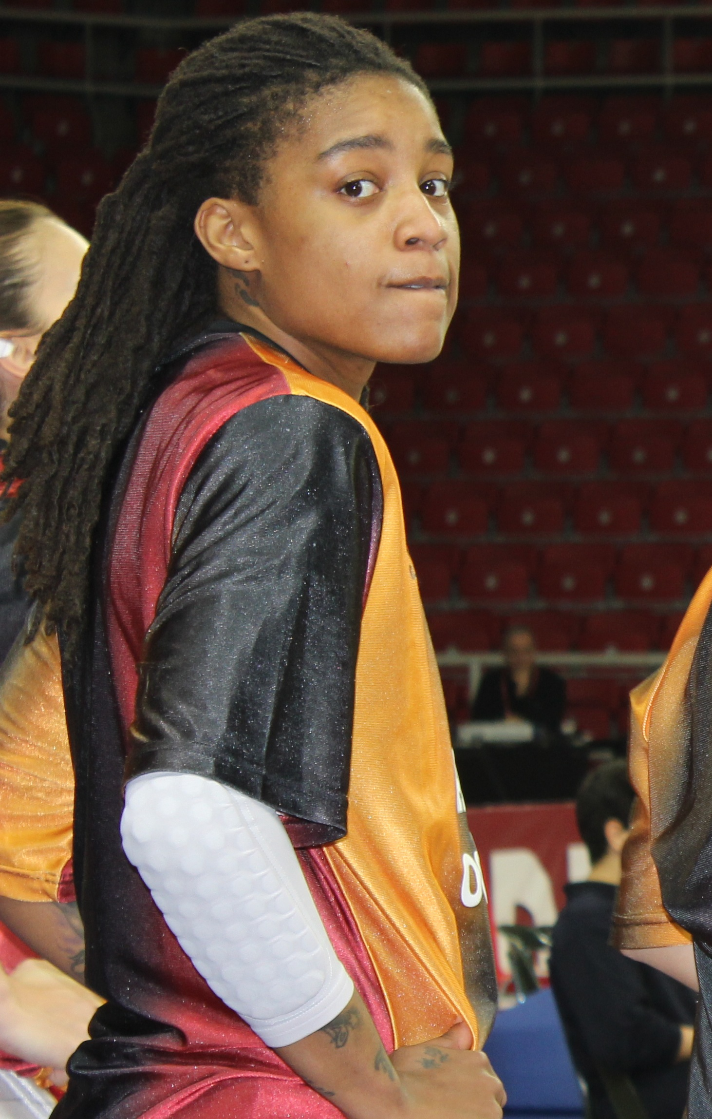 Shavonte Zellous